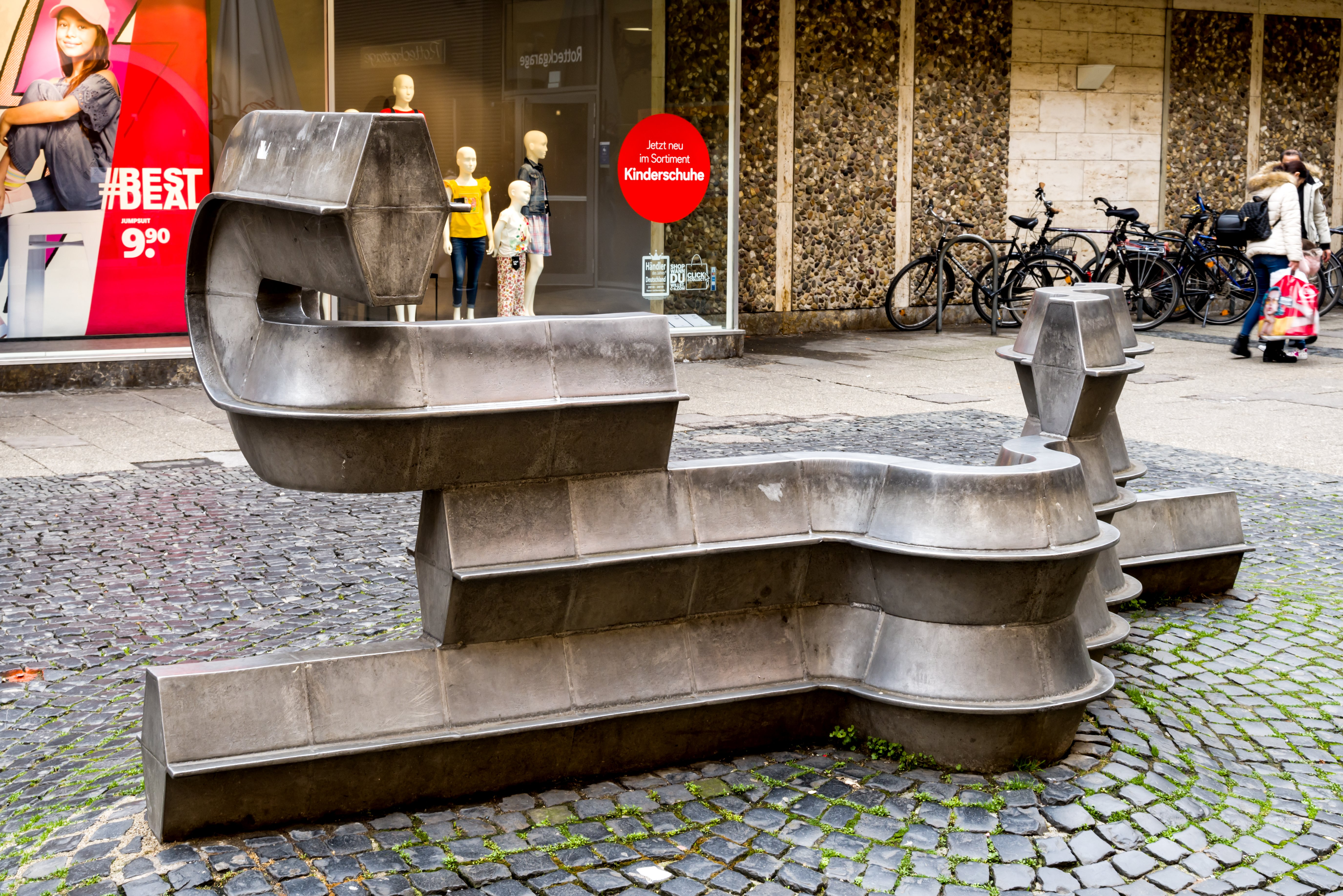 Die Skulptur zwischen Dem schwarzen Kloster und C&A